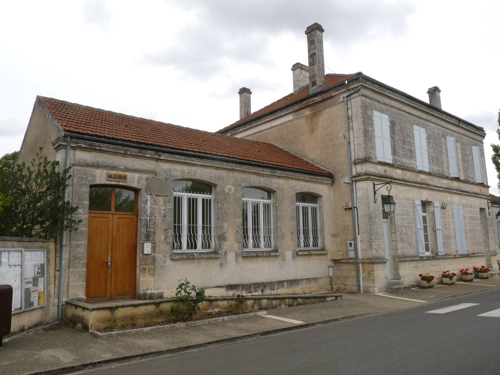 mairie d'Épenède, Charente, France